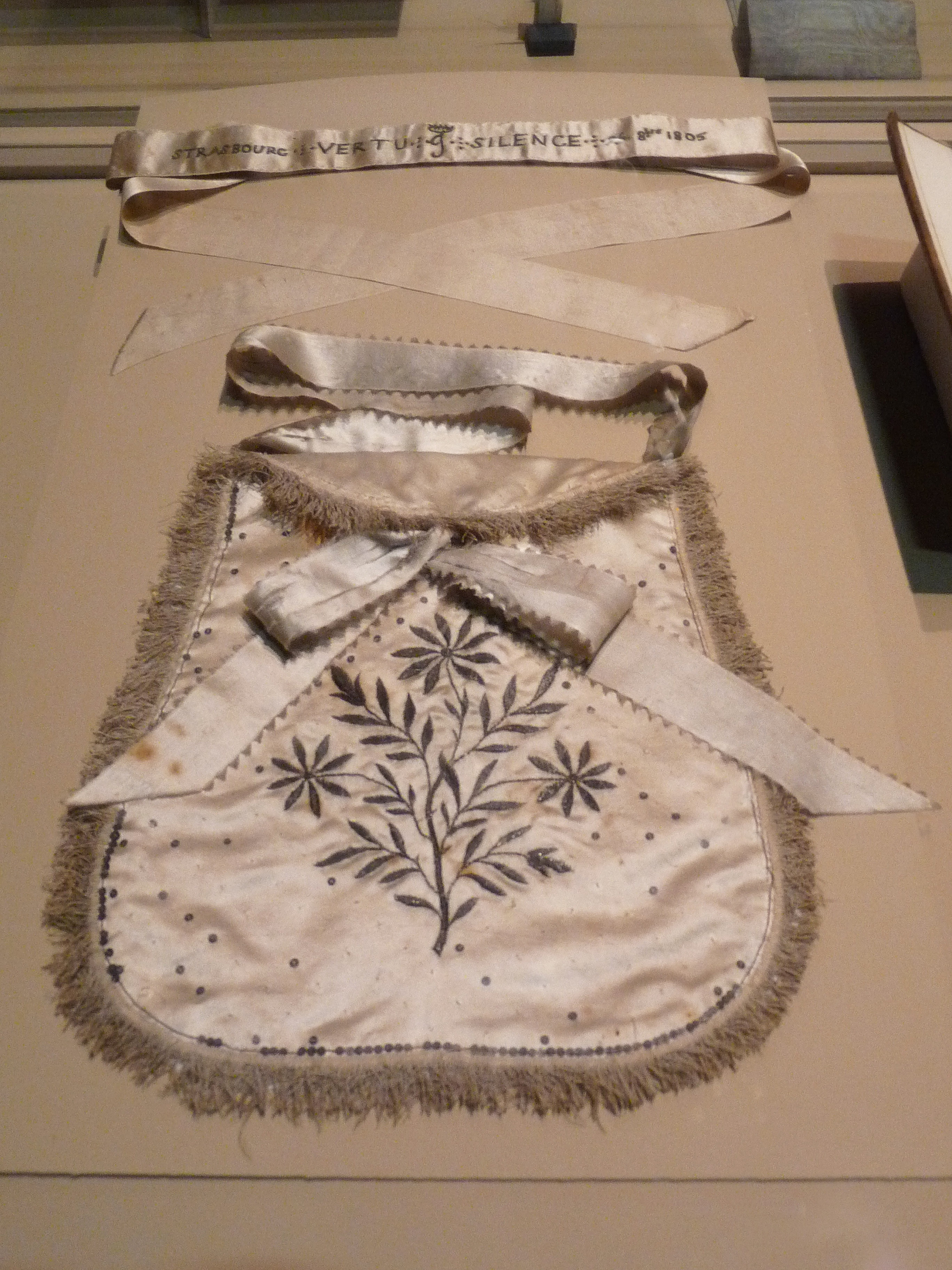 Franc-maçonnerie à Strasbourg : jarretière et aumonière de soie beige brodée dédiées à l'impératrice Joséphine. Elles lui auraient été remises à l'occasion de son admission à la loge de la Vertu lors de sa venue à Strasbourg en 1805